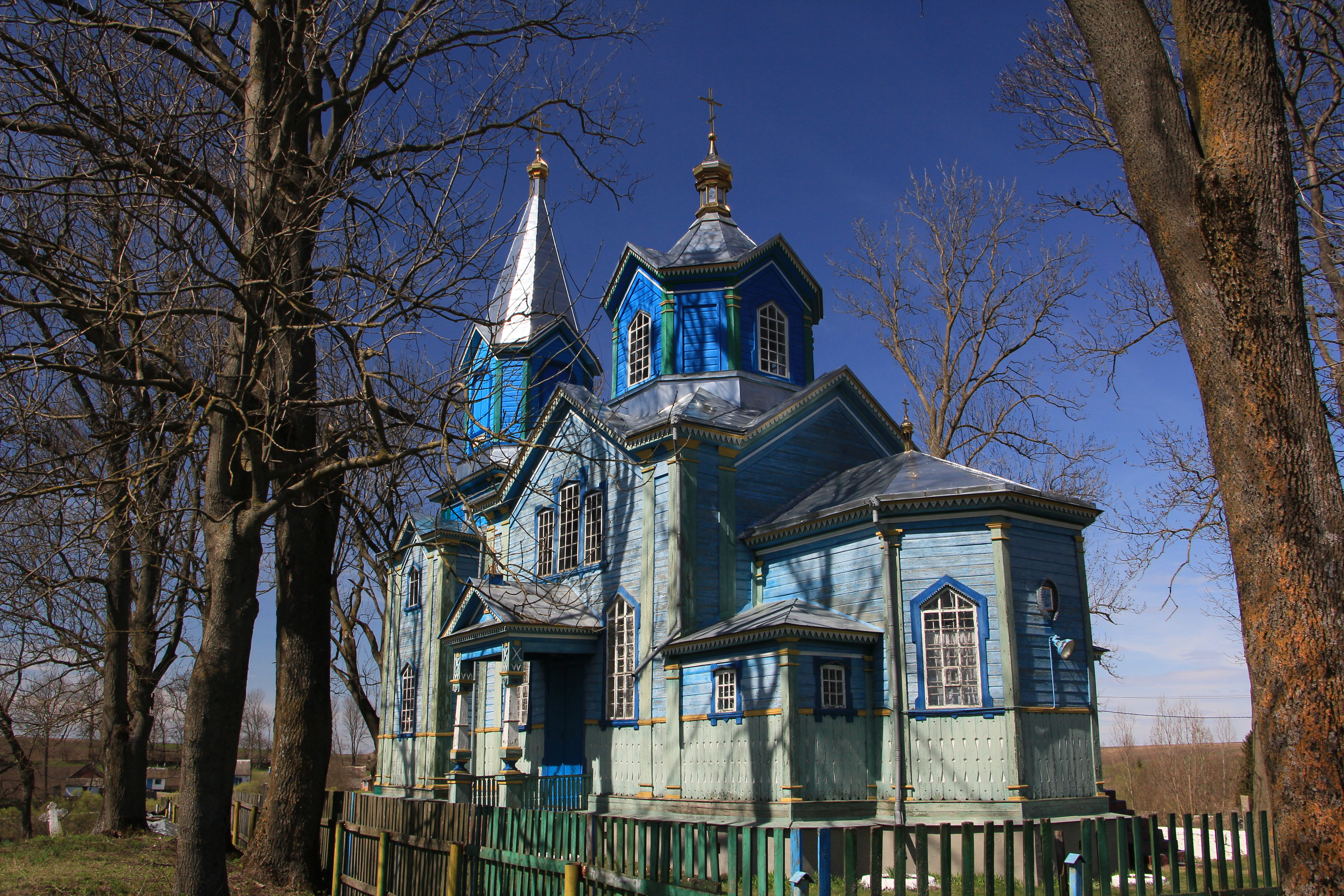 Дерев'яна церква в селі Раківець Збаразького району Тернопільської області